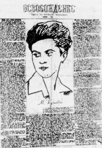 Освобождение